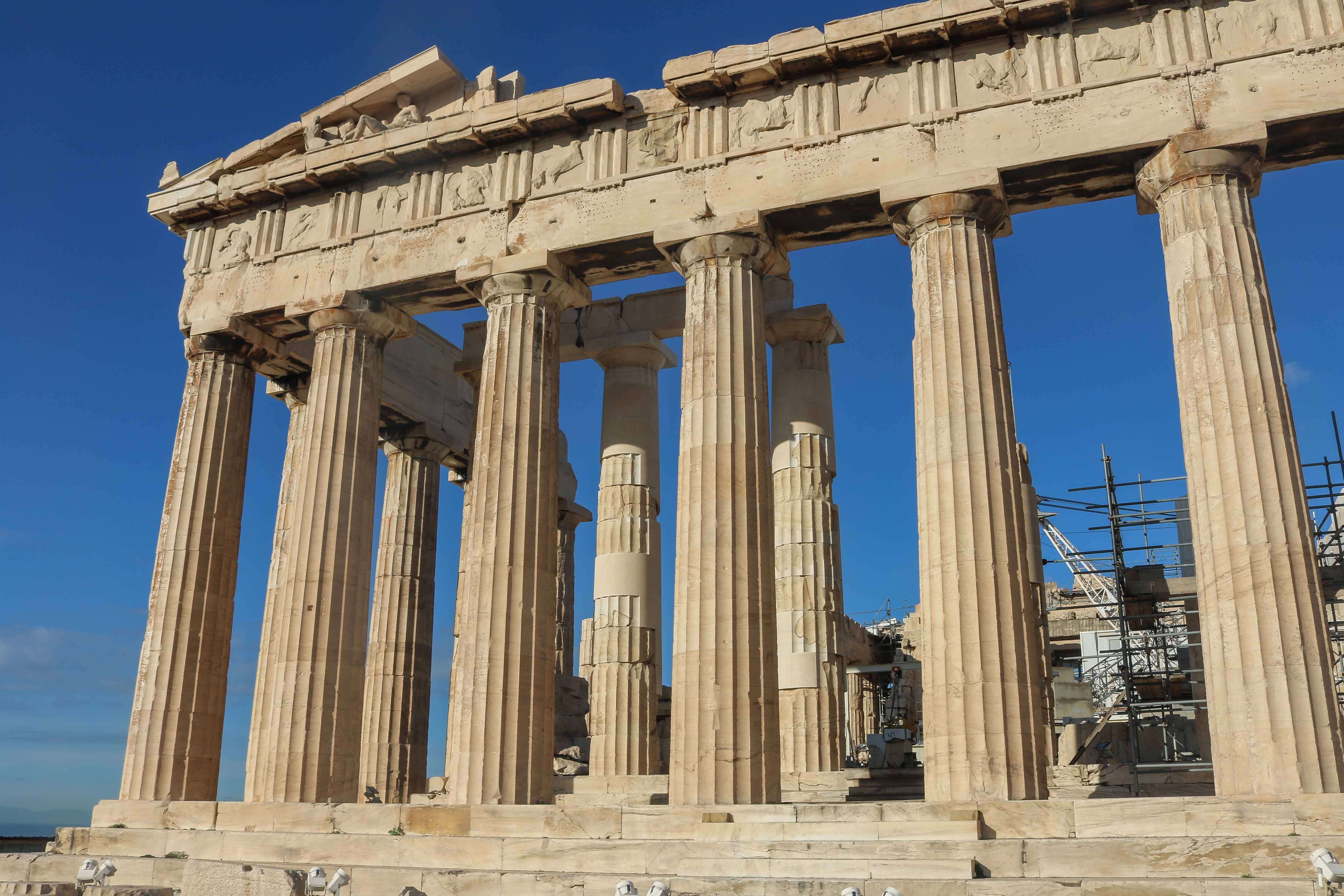 Akropolis, Athen: Parthenon von Osten.